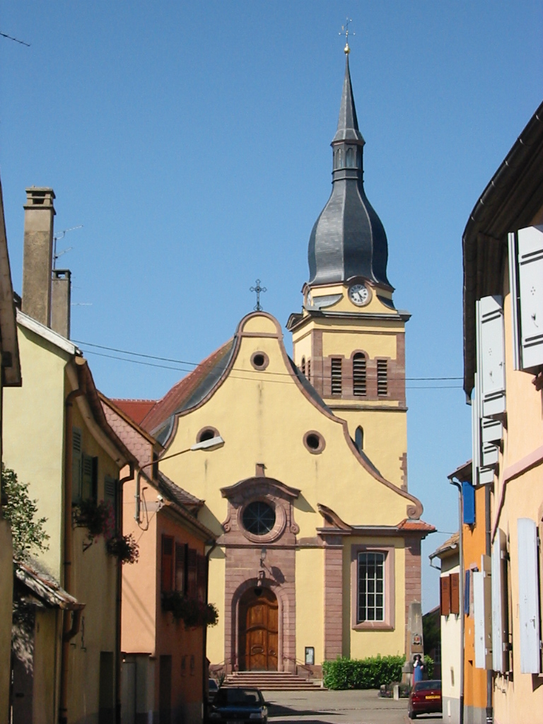 Église Saint-Barthélémy à Ingersheim (Haut-Rhin)